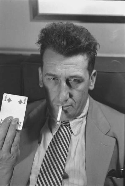 Giuseppe Marotta fotografato da Federico Patellani a Milano